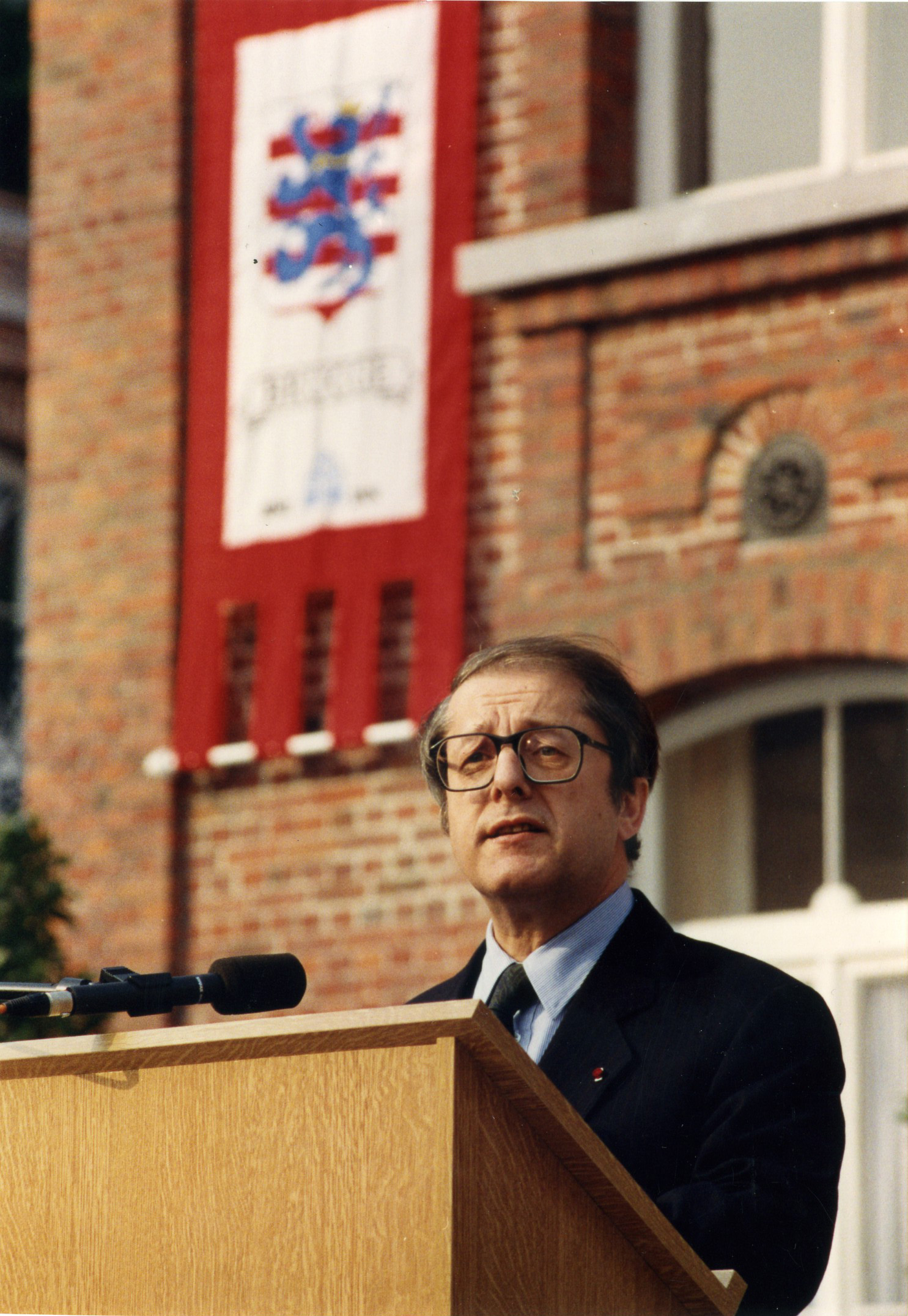 Foto Andries Van den Abeele